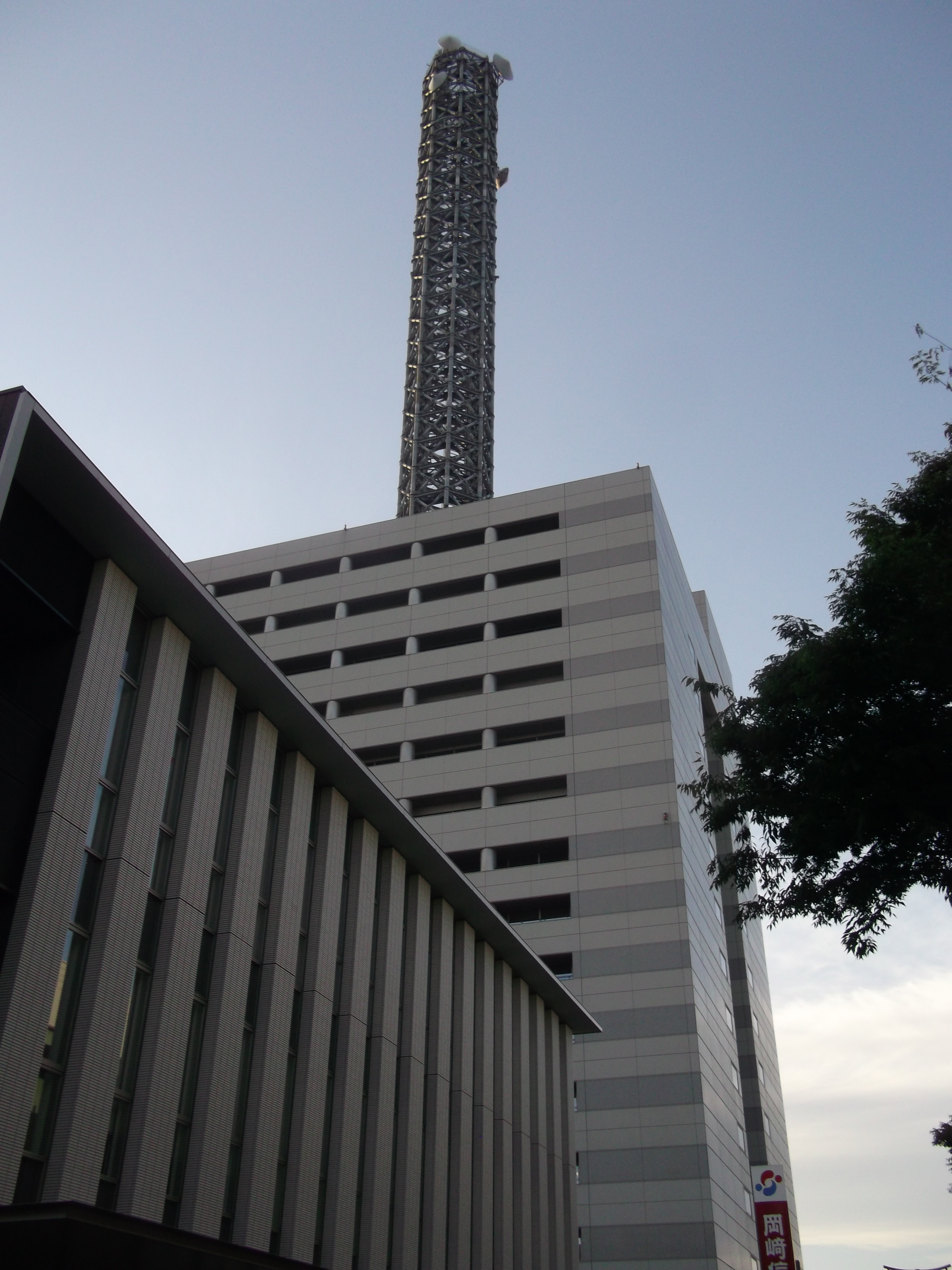 名古屋市中区千代田にある中部電力千代田ビルを東側公道南側より写す